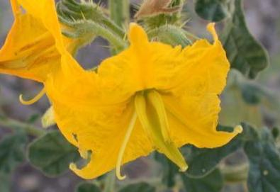 Buffalo Bur (Solanum rostratum)